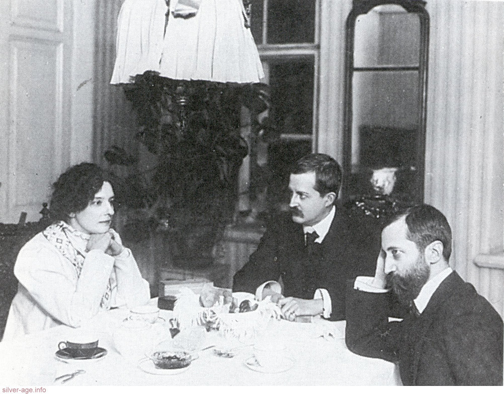 Gippius, Filosofov and Merezhkovsky in 1920